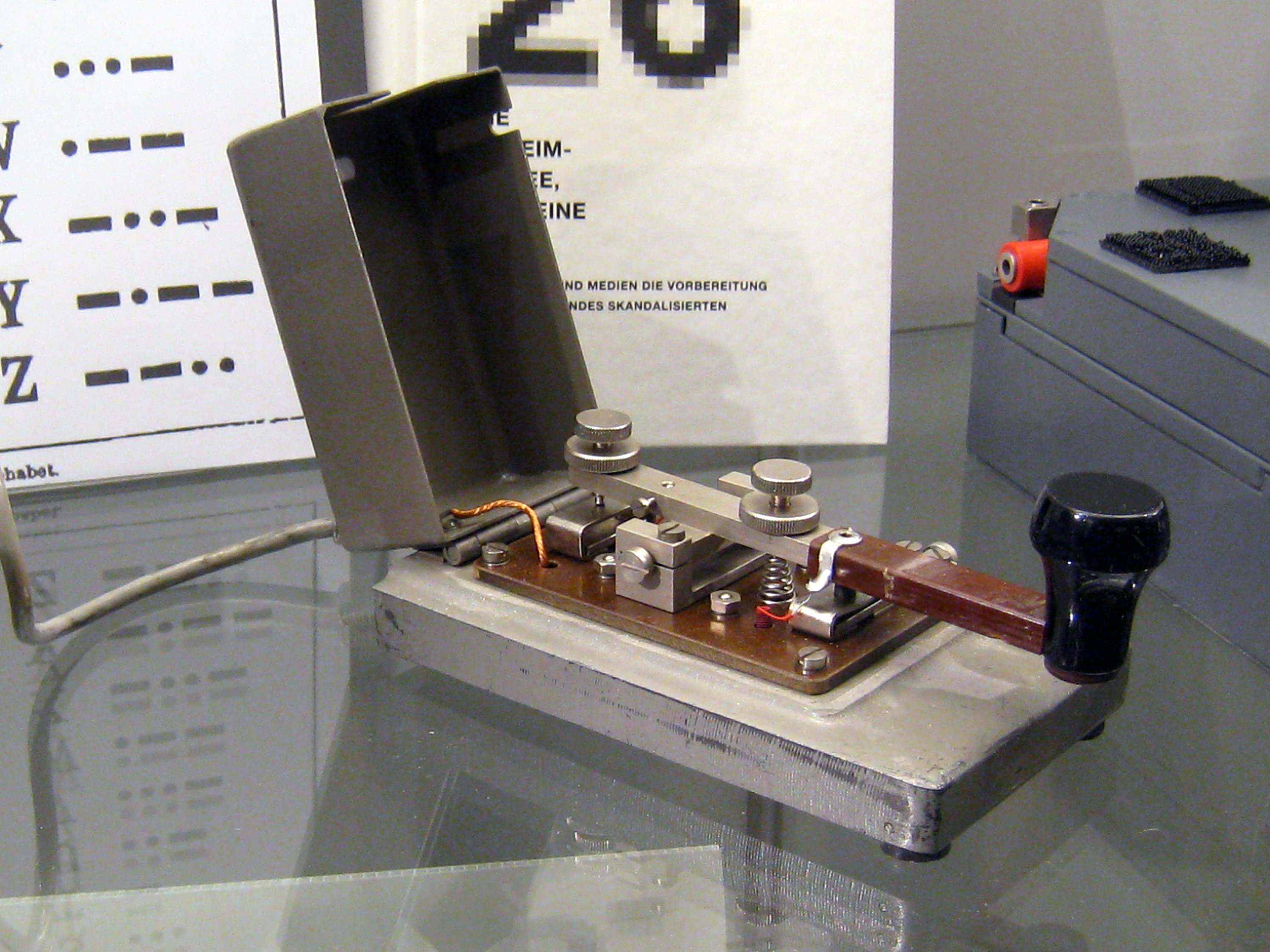 Schweizer Militär-Morsetaste im Festungsmuseum Reuenthal